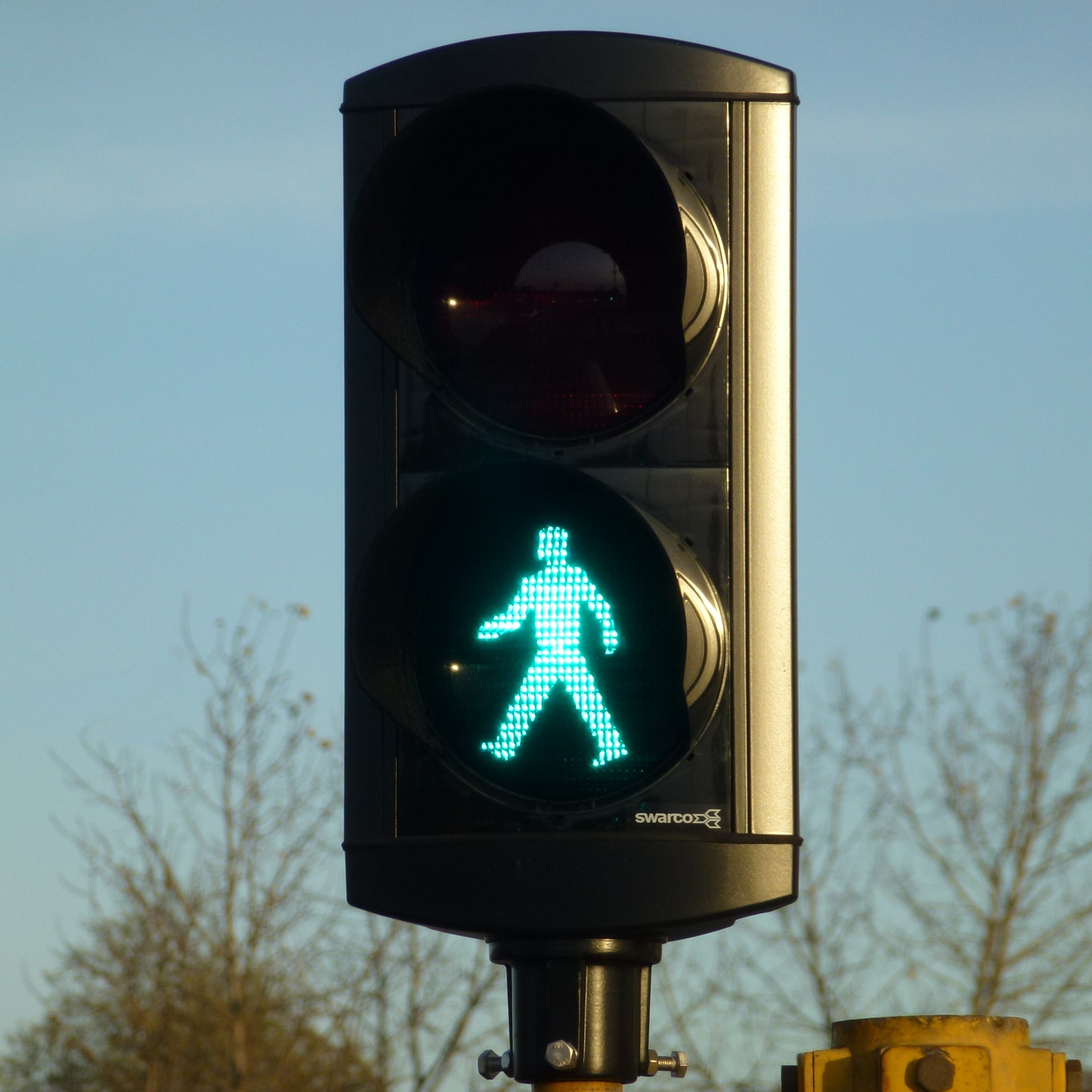 Trafiksignal gående grönt